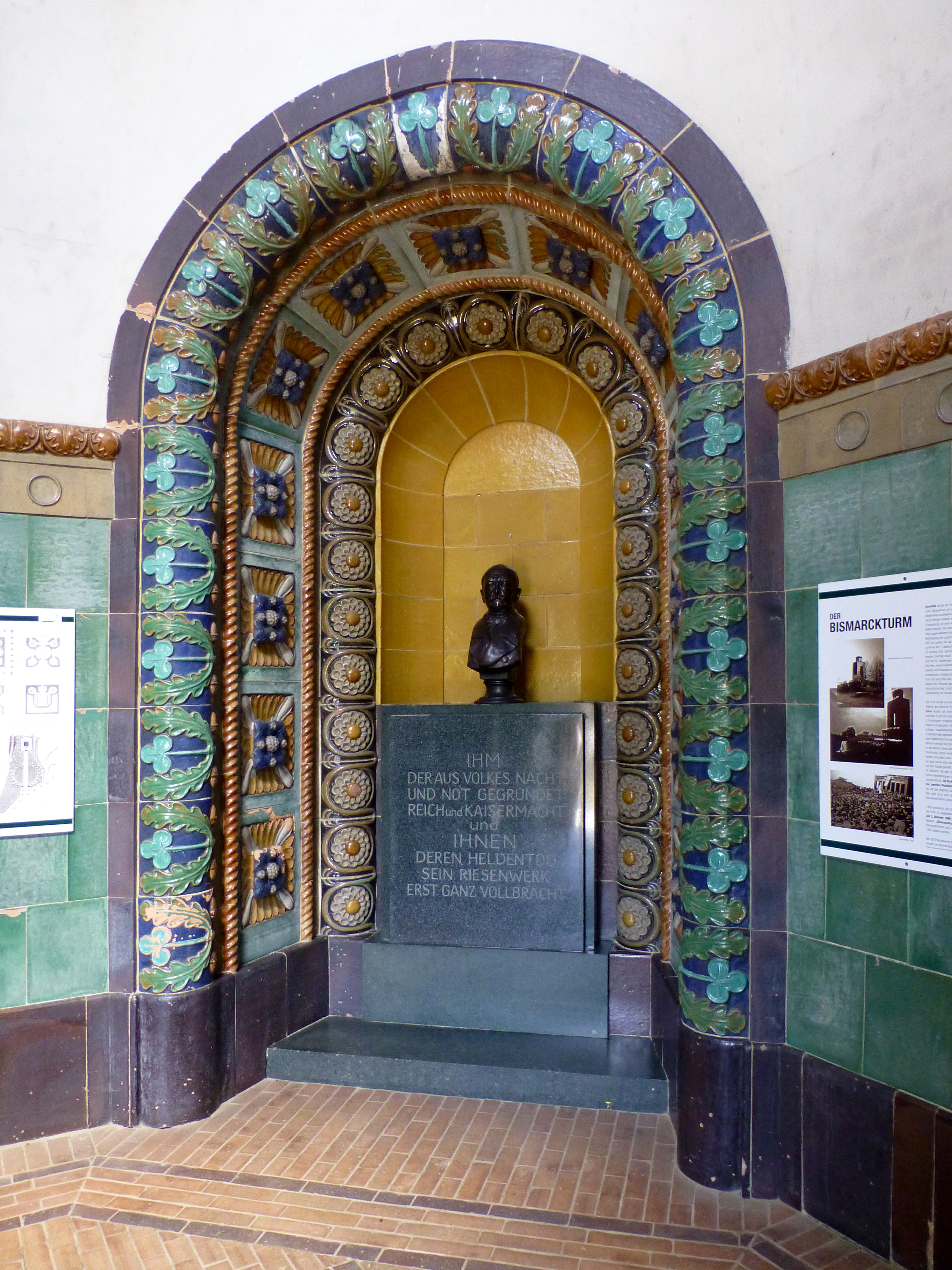 Bismarckturm Burg (Spreewald); Eingangshalle mit Nische und Bismarckbüste